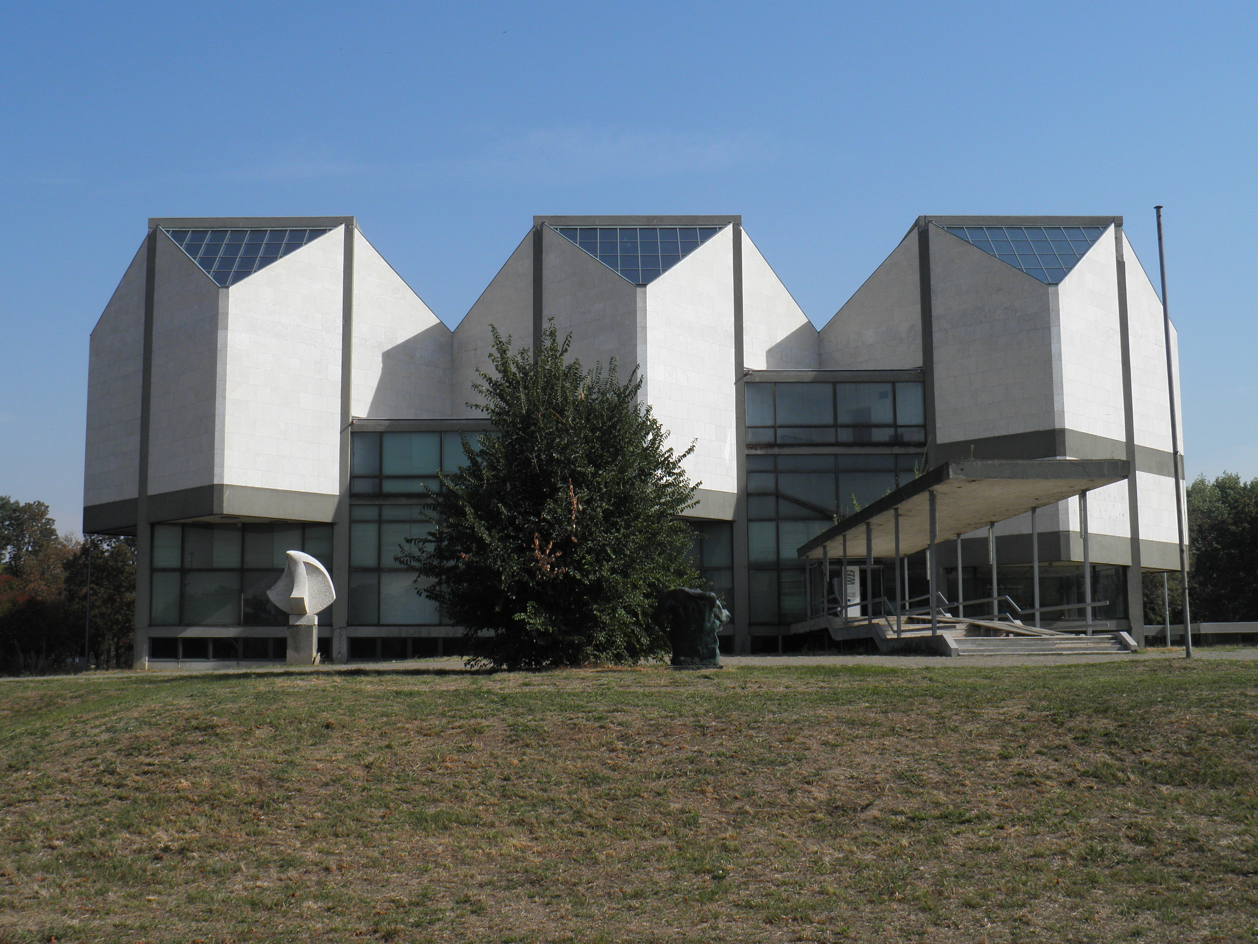 Muzej primenjenih umetnosti